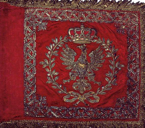 Proporzec szwadronowy jednej z brygad Kawalerii Narodowej; Muzeum Narodowe w Krakowie